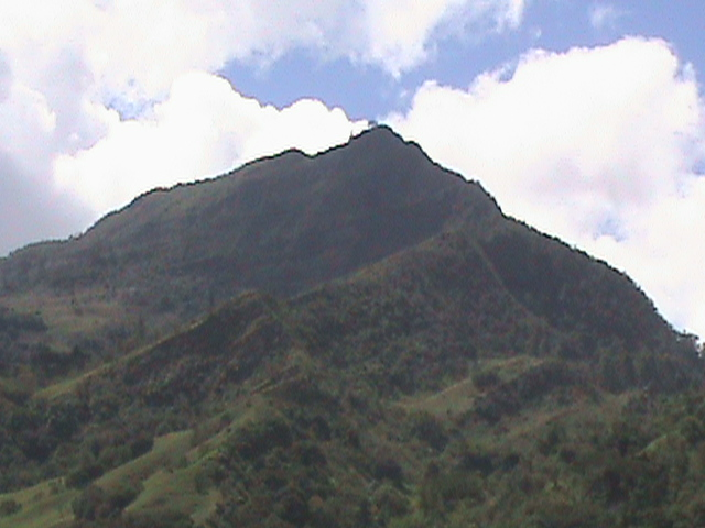 cerro ubicado en pacho cundinamarca